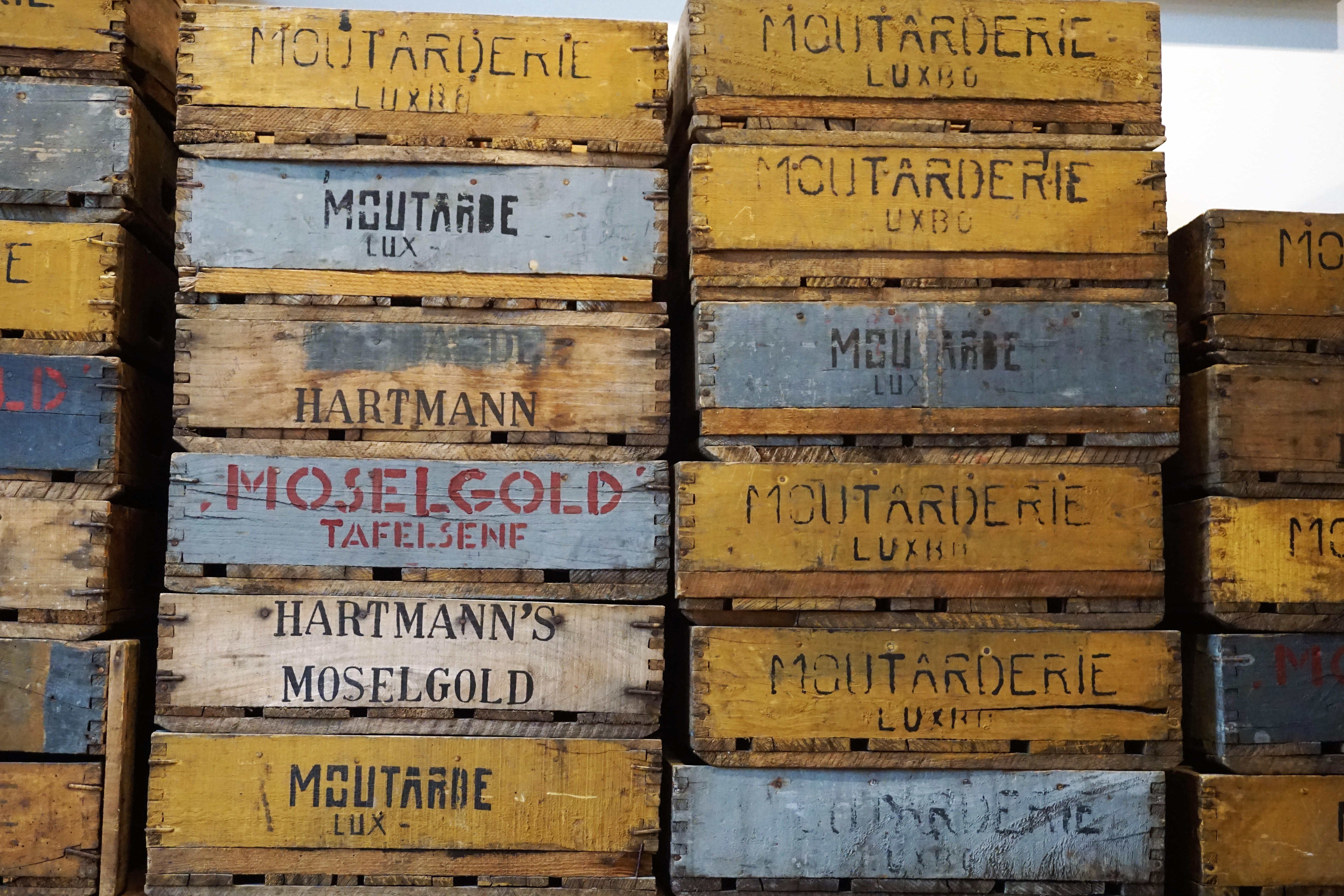 Luxembourg. Musée dans l'ancienne moutarderie « Muerbelsmillen ». Anciennes caisses pour les verres de moutarde.